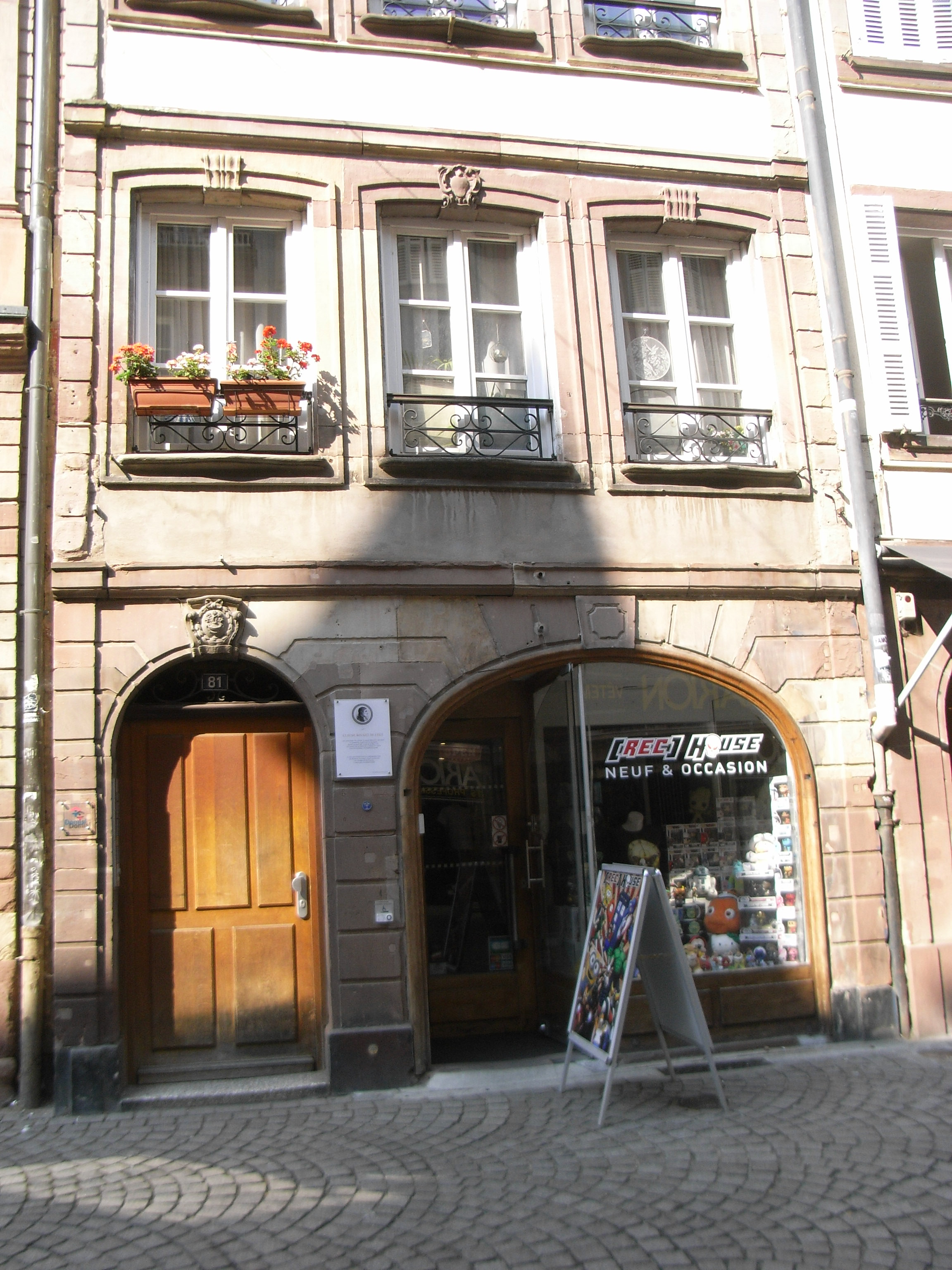 Maison où fût composée La Marseillaise par Claude Joseph Rouget de Lisle en 1792, au 81 Grand rue à Strasbourg (France)